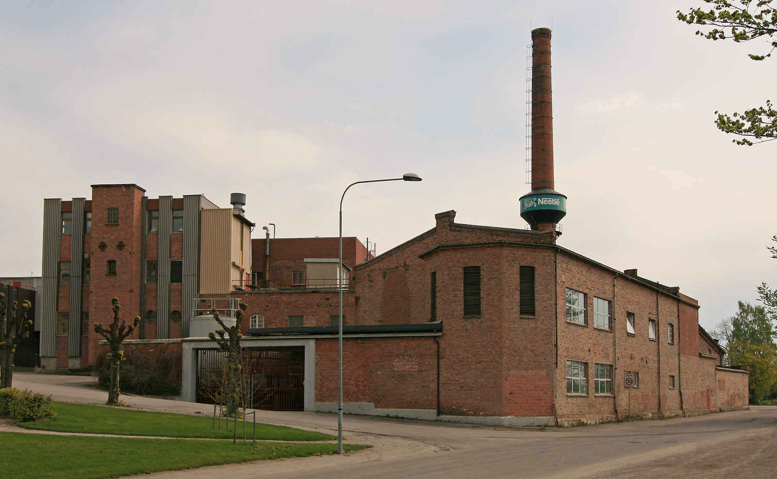 Melkefabrikken, Hamar